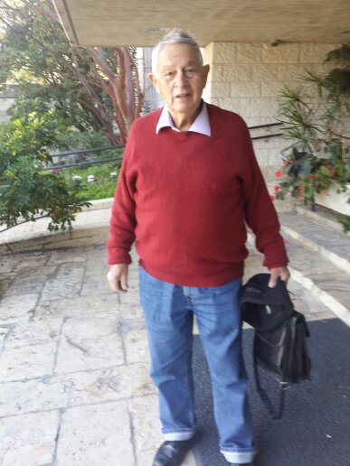 יוסי פלדמן בכנס לציון 30 שנה להקמתה של המועצה לשימור אתרים . צילום אלי אלון